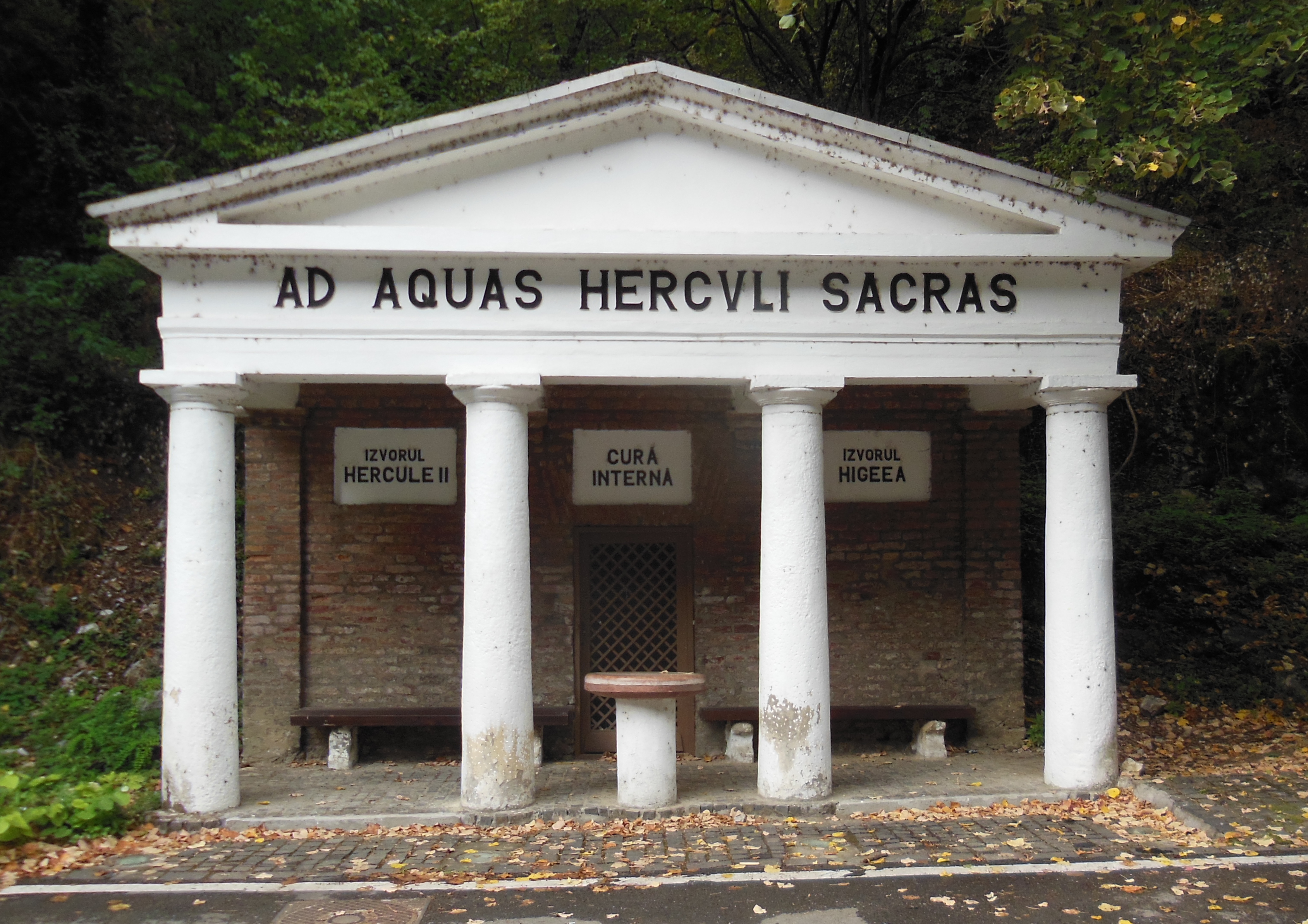 Izvorul Hygeea, cu edicul, oraș Băile Herculane, Str. Romană f.n.